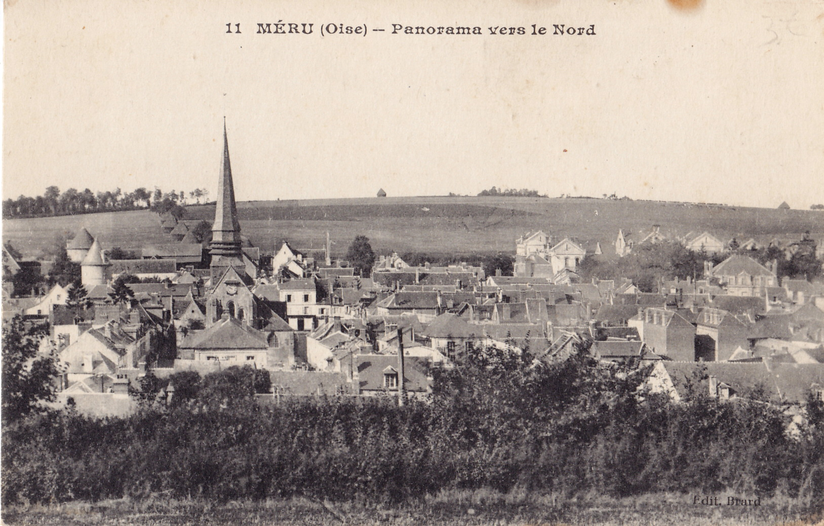 Carte postale ancienne éditée par Brard : MERU - Panorama vers le Nord